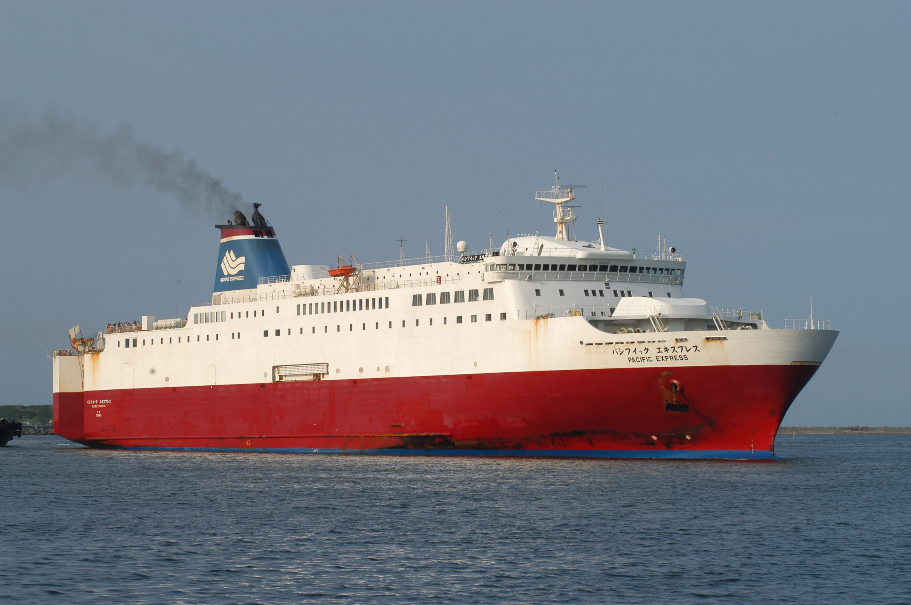 宮崎港に入港するマリンエキスプレス京浜航路のパシフィックエキスプレス